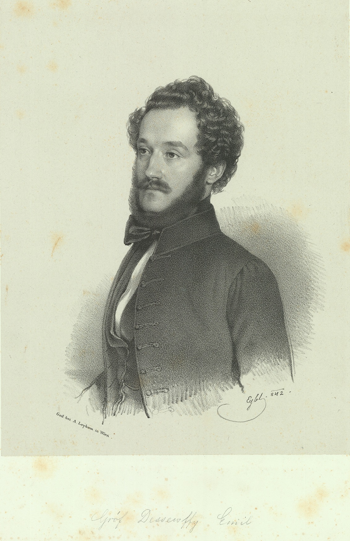 Cserneki és tarkeői gróf Dessewffy Emil (Eperjes, 1814. február 24. – Pozsony, 1866. január 28.) az MTA tiszteleti tagja és elnöke.